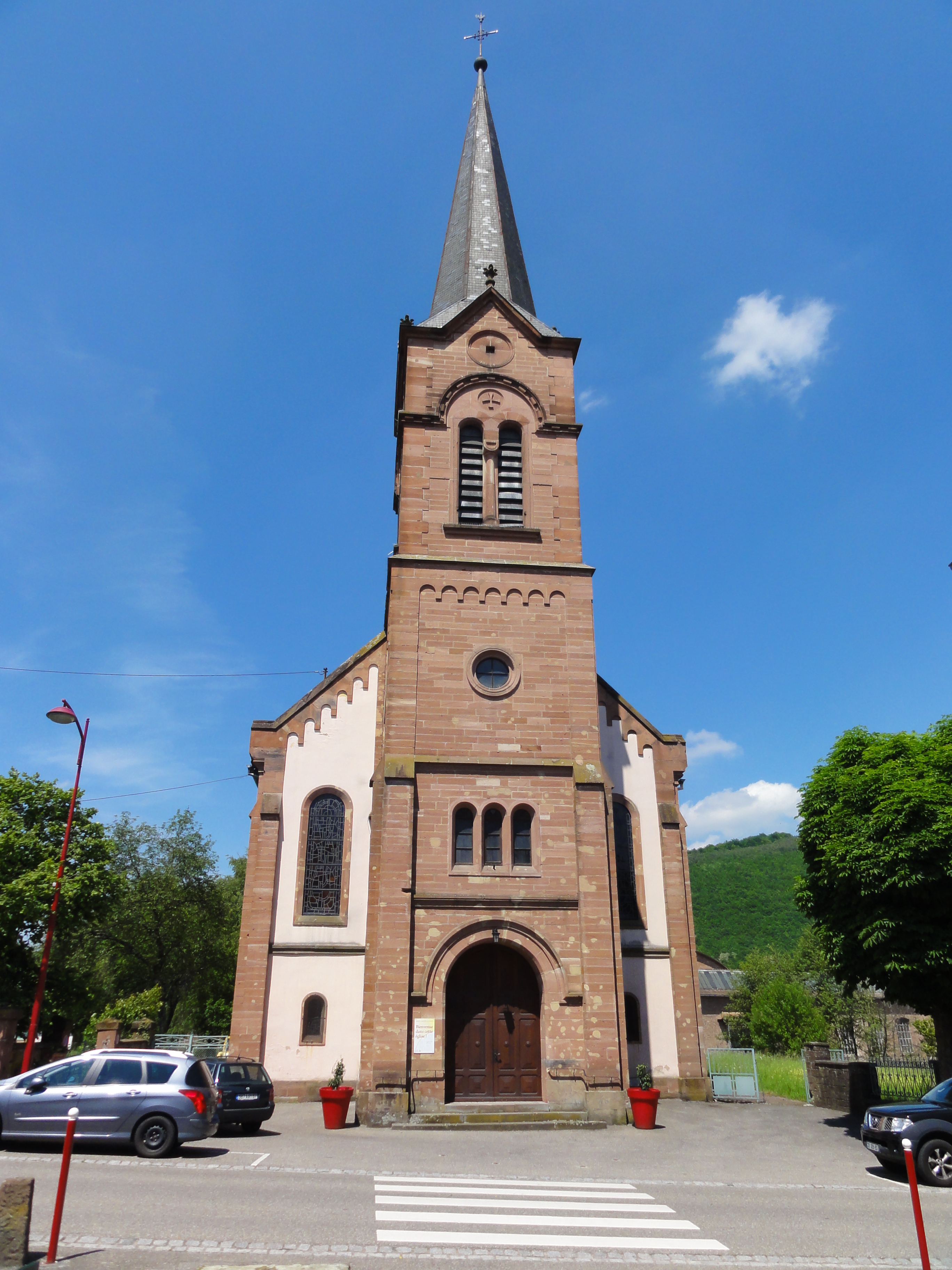 Alsace, Bas-Rhin, Zinswiller, Église Saint-Jacques-le-Majeur (1868), Grand'Rue.